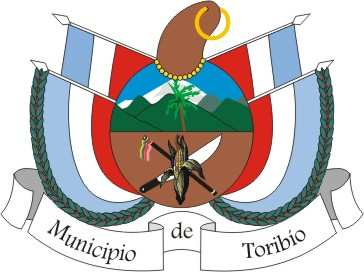 Escudo del Municipio de Toribío Cauca